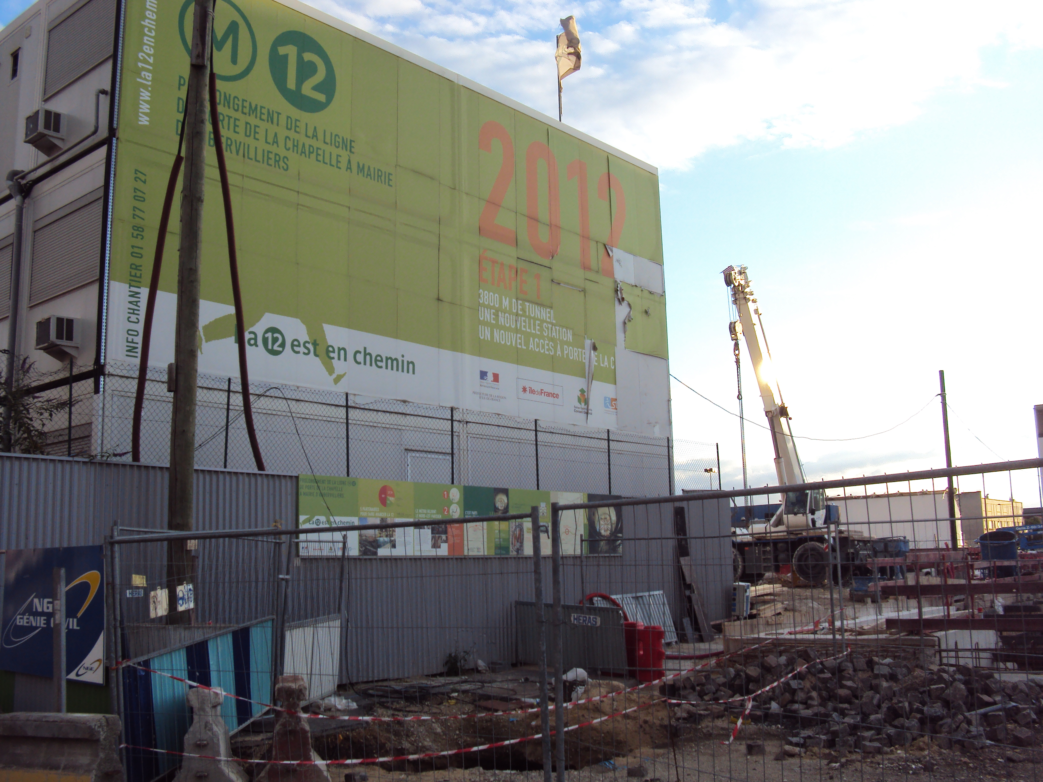 Chantier de la Station Front Populaire en juillet 2012